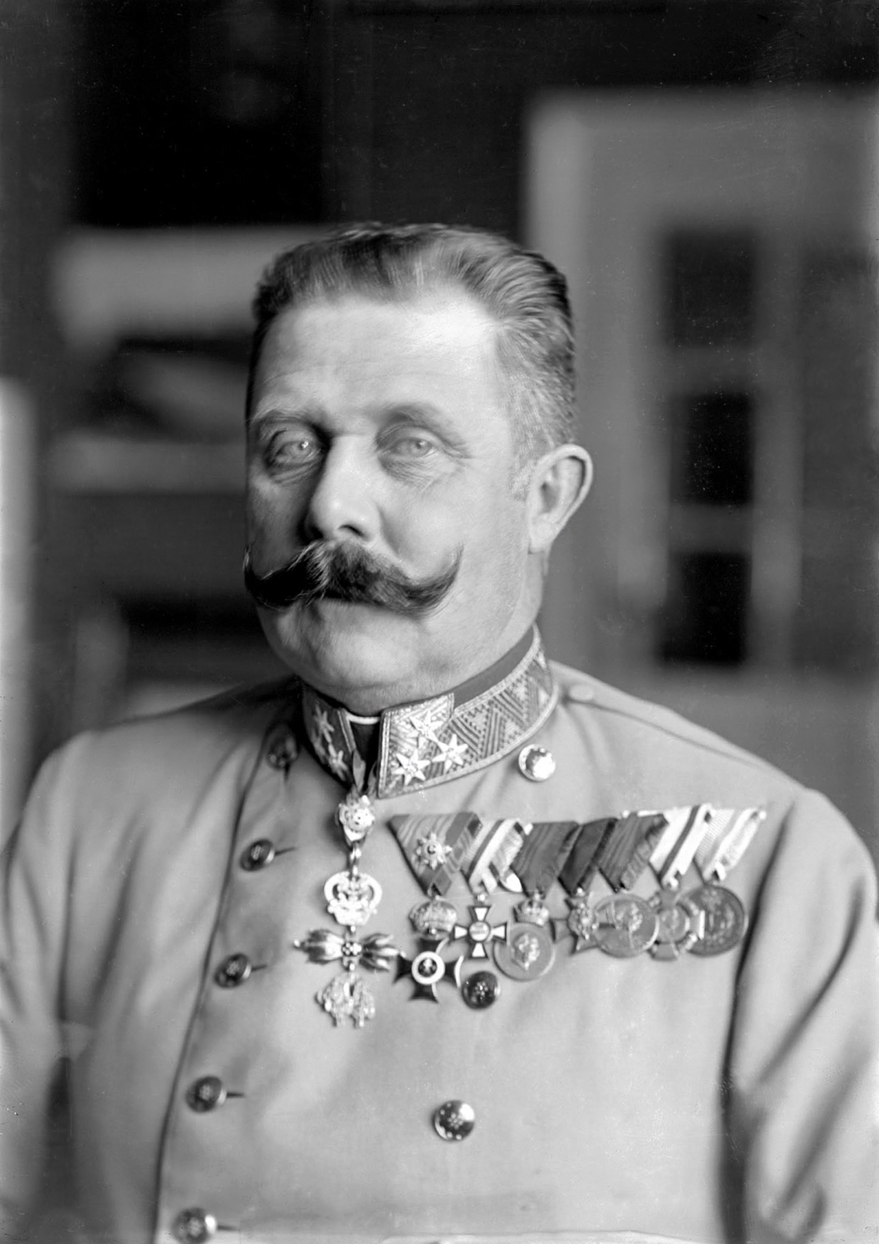 Brustbild Franz Ferdinand, Erzherzog von Österreich-Este (1863–1914) in Uniform.